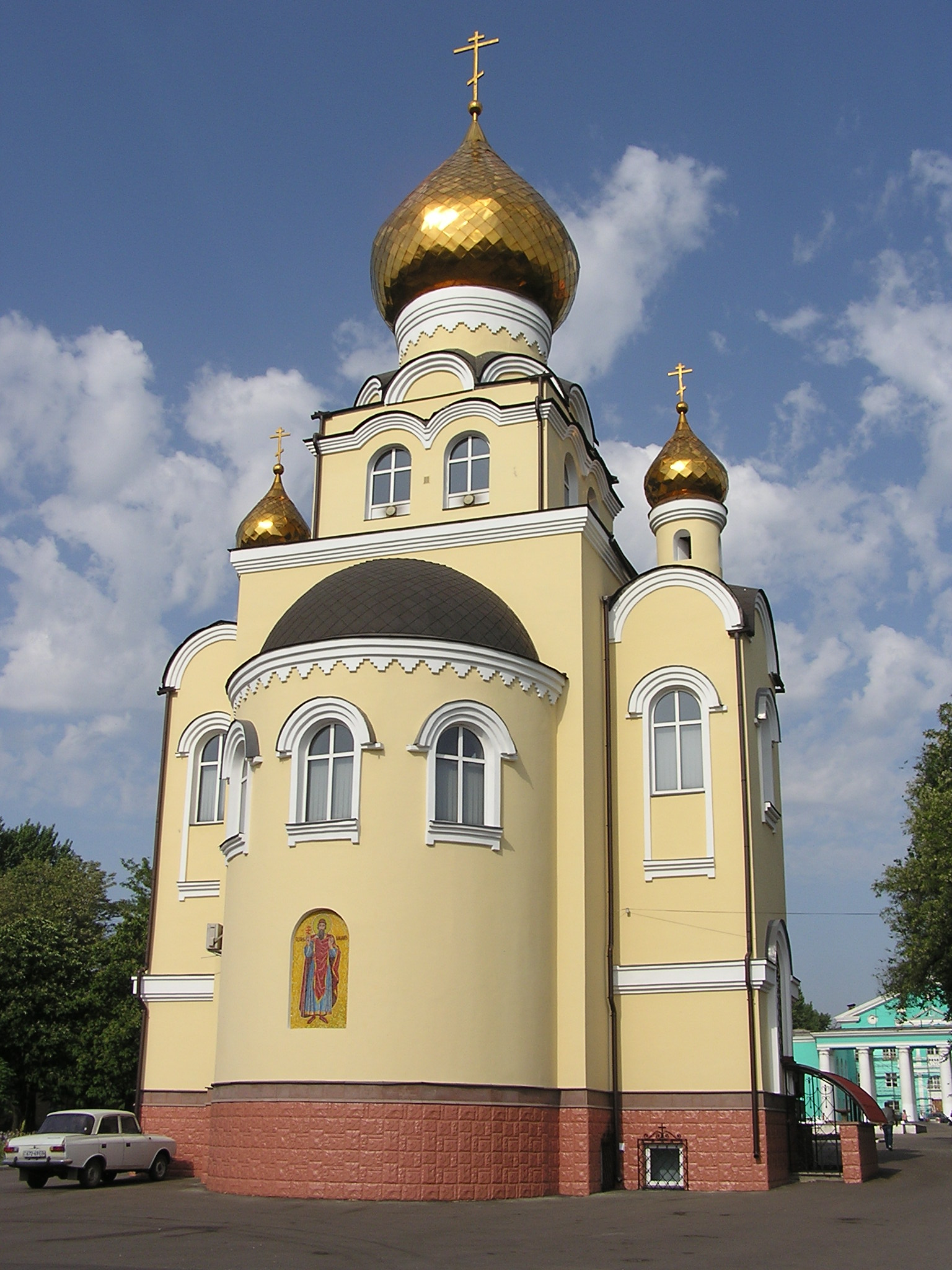 Донецк. Храм Святого Равноапостольного Князя Владимира